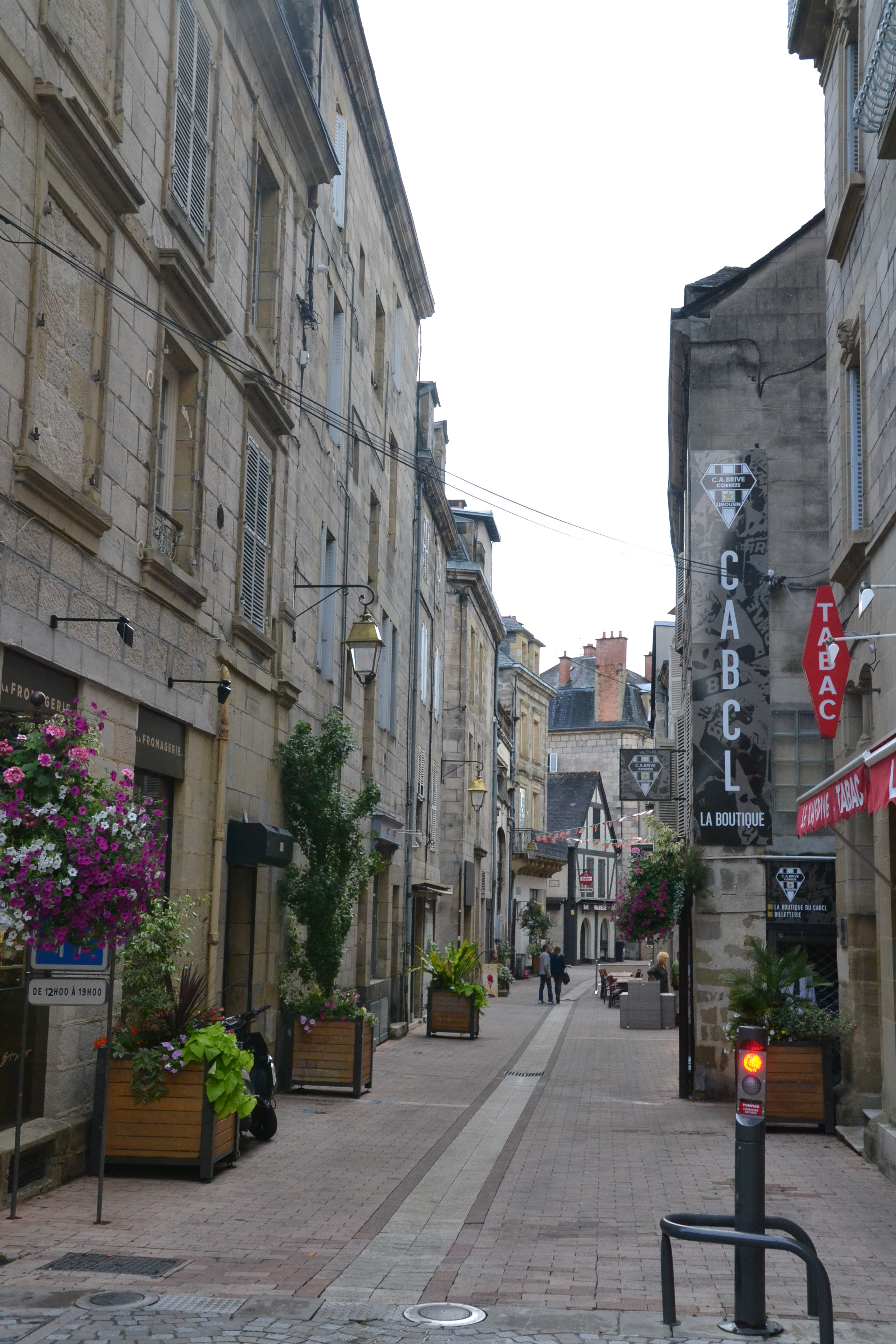 Rue de la République, Brive-la-Gaillarde (Corrèze, France).